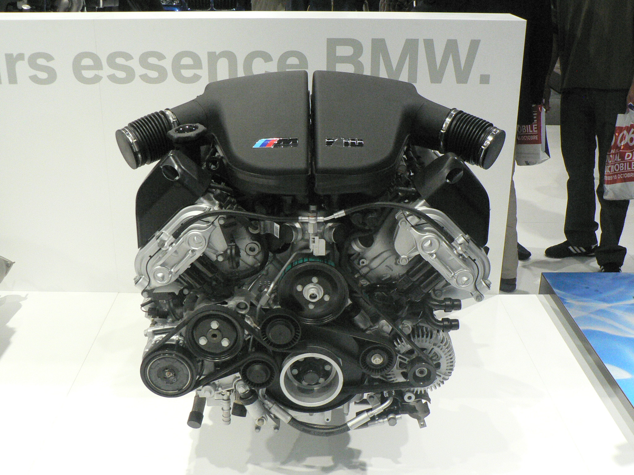 Mondial de l'automobile, Paris 2006